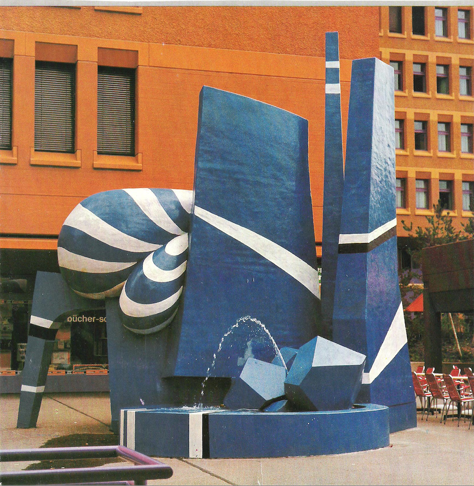 " La Fontaine Bleue" de Wilfrid Moser, sise à Oerlikon Zürich